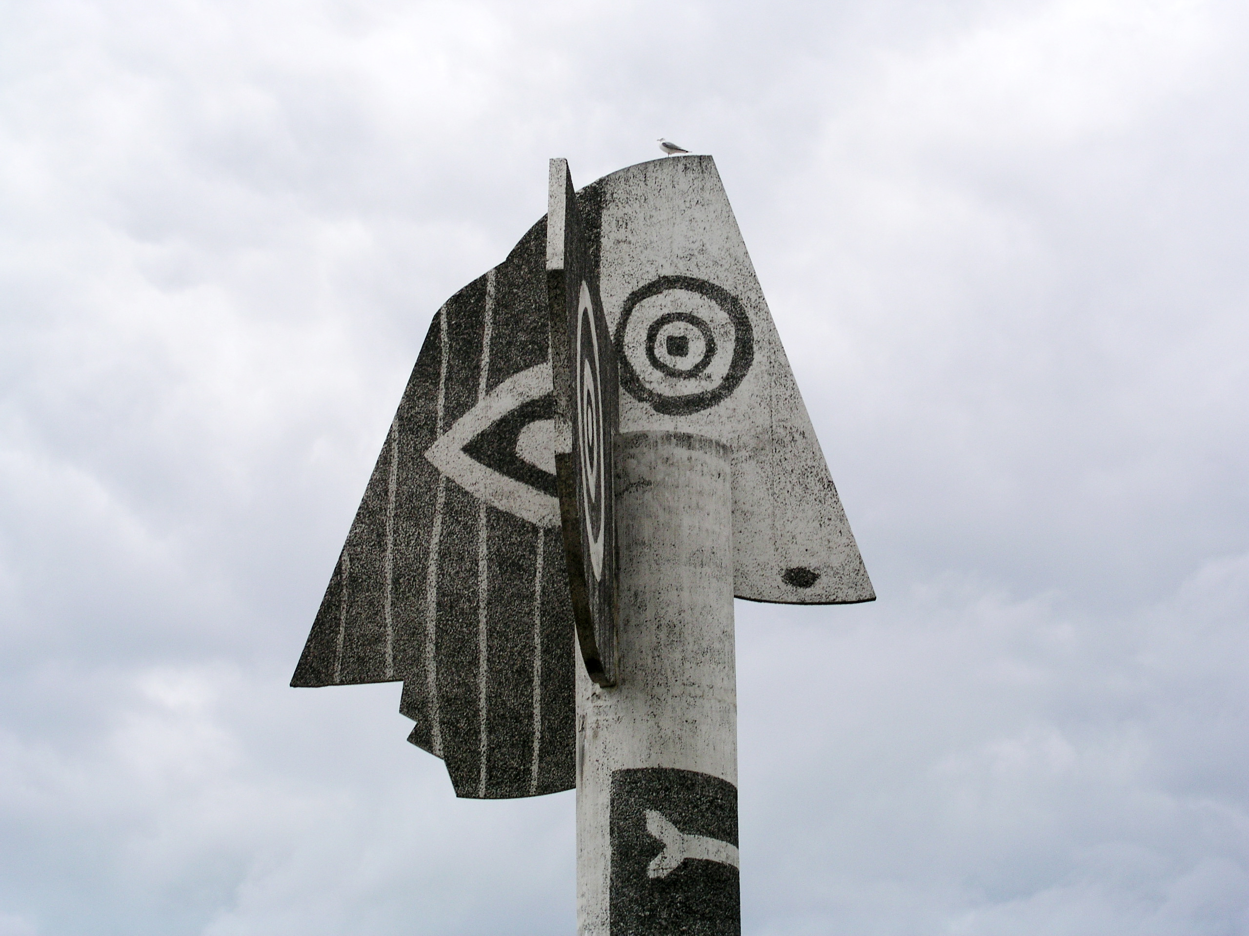 Picasso statue on Strandudden, Kristinehamn, Sweden